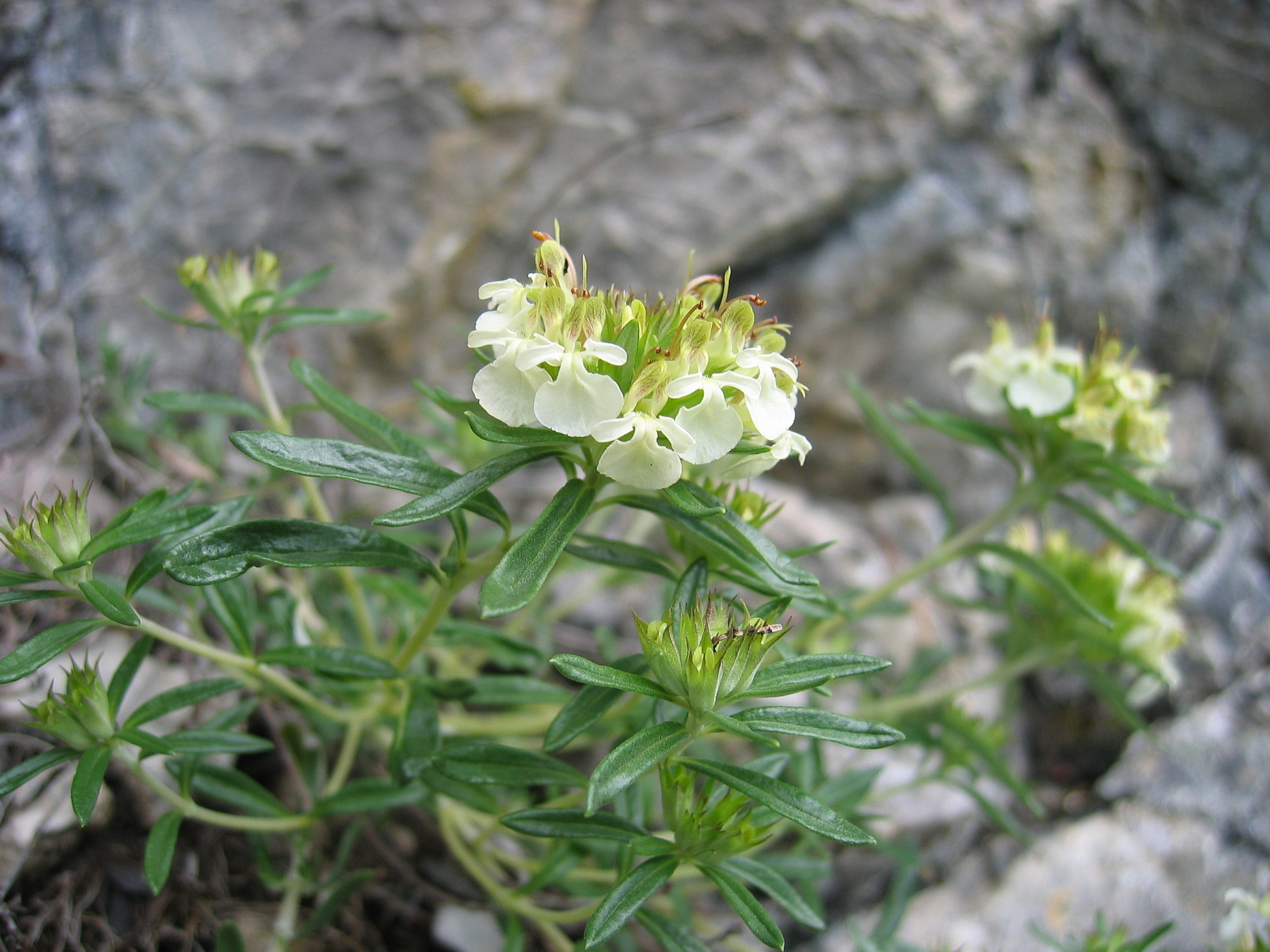 Teucrium montanum, Miesweg/Traunsee, Upper Austria, Austria